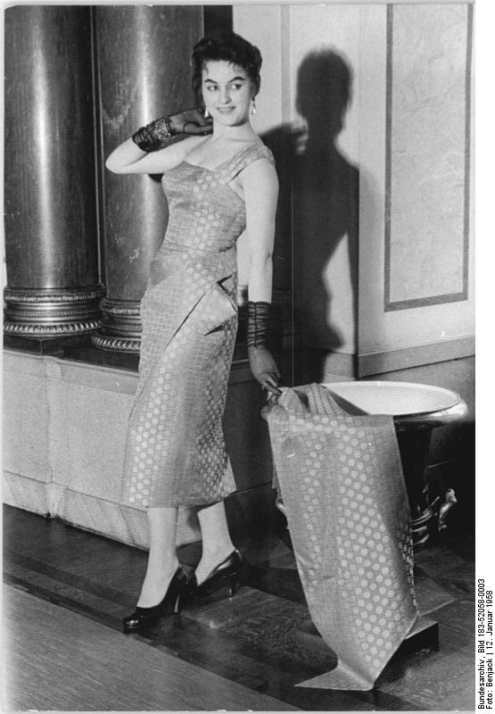 Zentralbild-Benjack Frö-Qu 12.1.1958 Modeatelier Kaiser, Altenburg, bereitet Messekollektion vor. Etwa 50-80 Modelle wird die diesjährige Kollektion des Modeatieliers Lucie Kaiser, Altenburg umfassen. Der seit 11 Jahren bestehende Modesalon für Cocktail- und Abendkleider hat bereits tausende von Festgewändern für Frauen geschaffen. Auch im Ausland sind die kleidsamen Perlen-, Taft- und Chinabrokatgebilde aus Altenburg beliebt. UBz. Ein Cocktailkleid mit Stola aus Kunstseide in Krawattenmuster. Besonders zu beachten sind der geraffte Schürzenteil und der einseitige Träger.